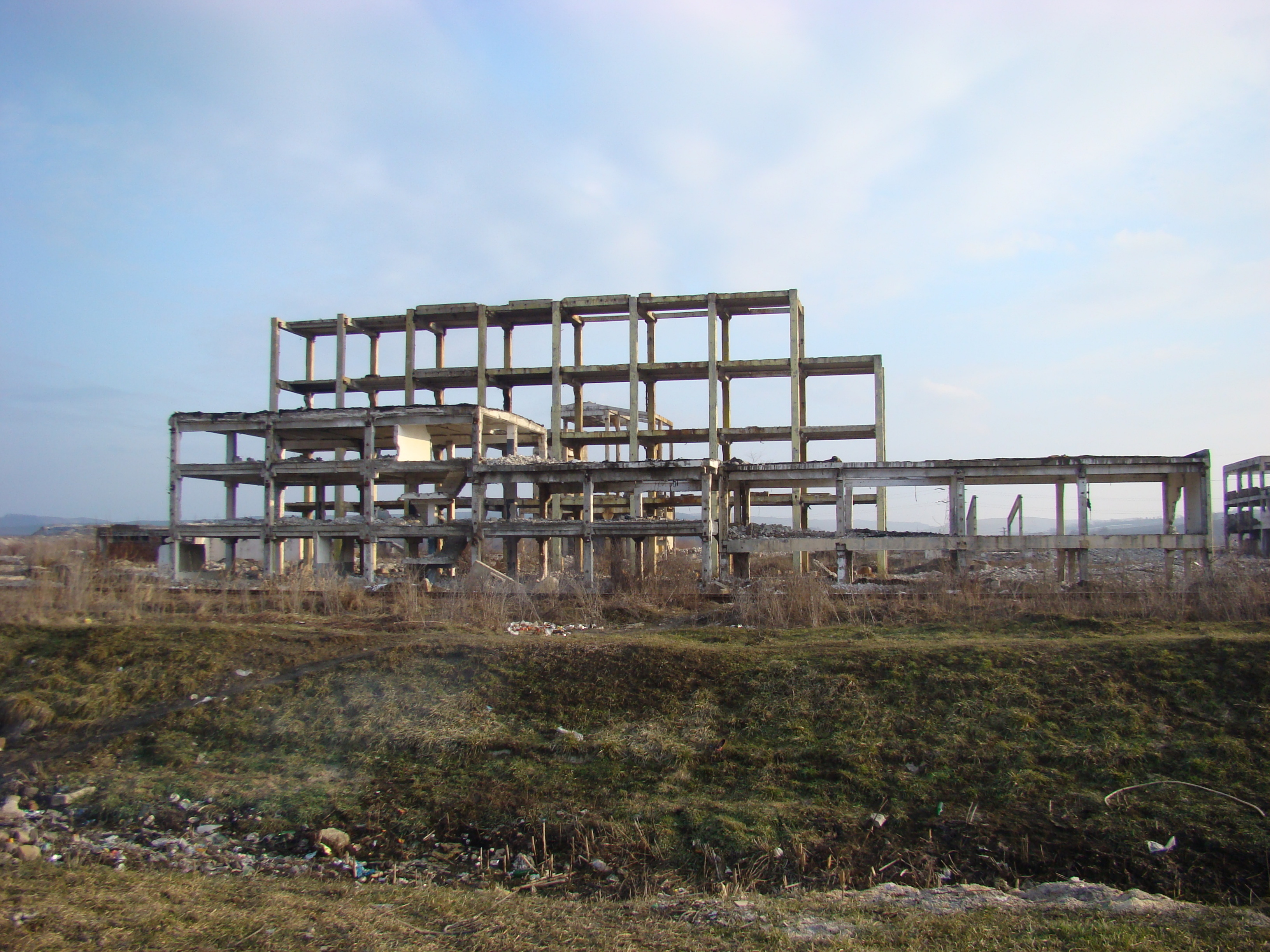 Ruinele Combinatului Chimic Târnăveni, județul Mureș